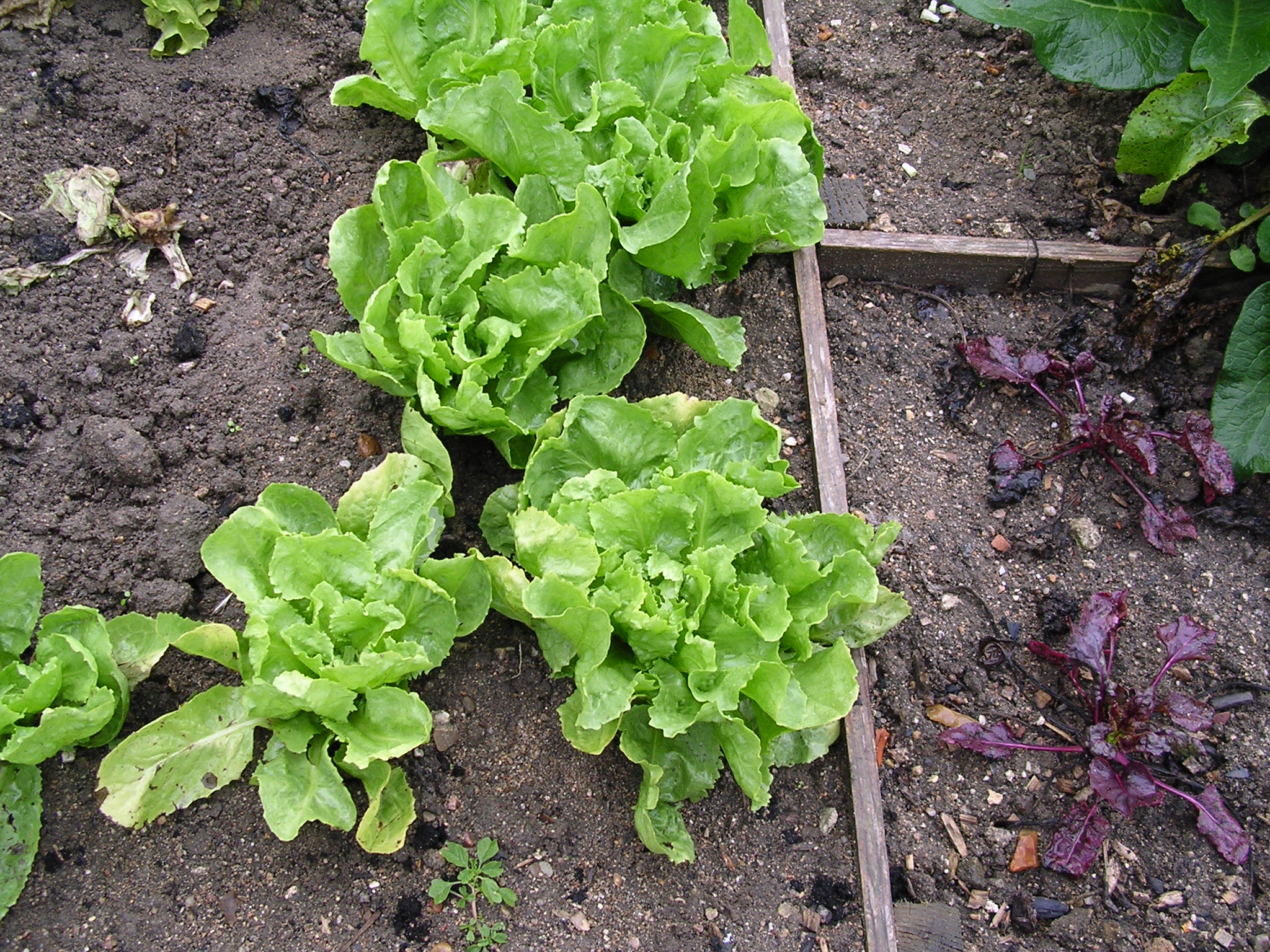 batavia